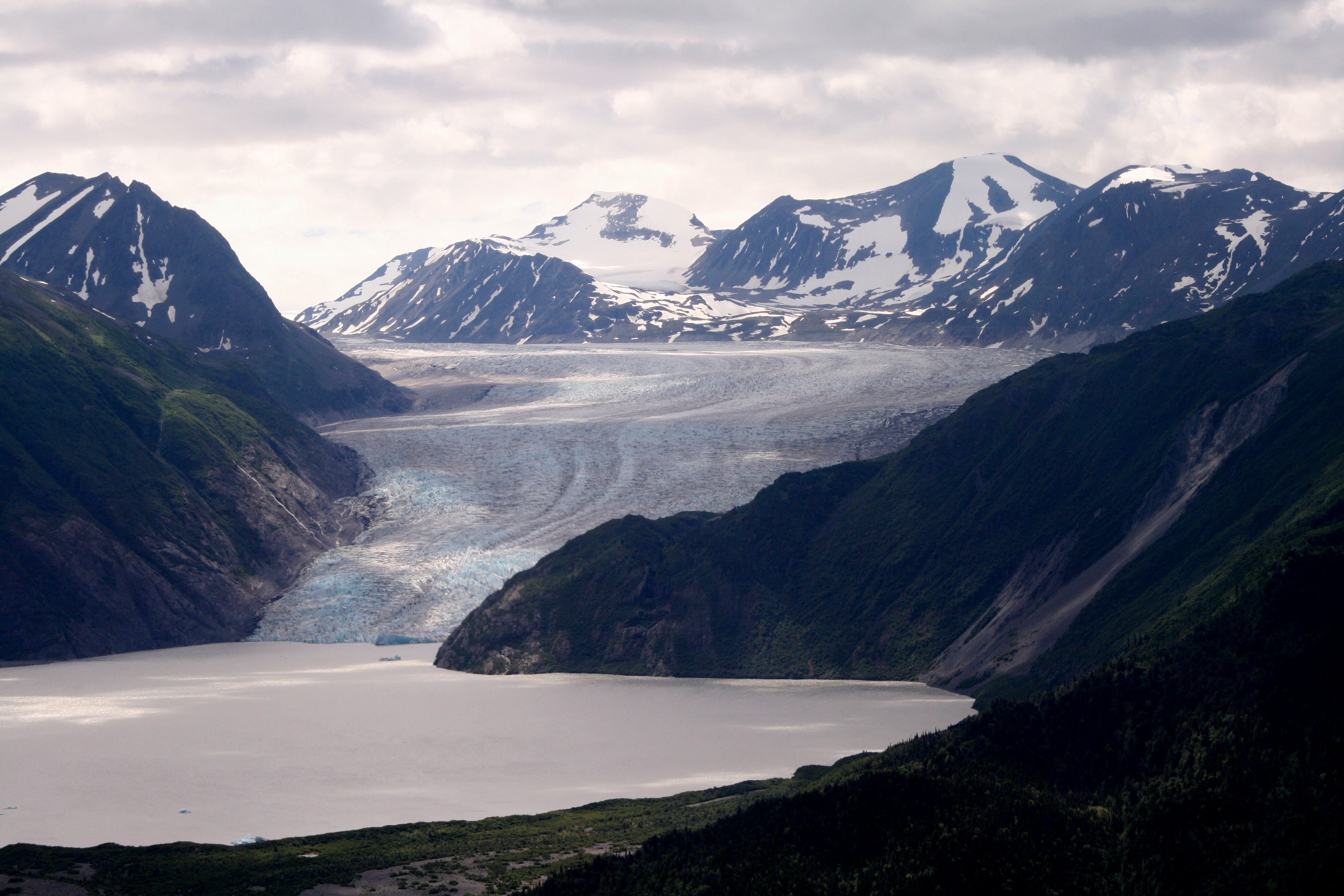 Photo: Matthew Strausser, USFWS 2011 Wilderness Fellow